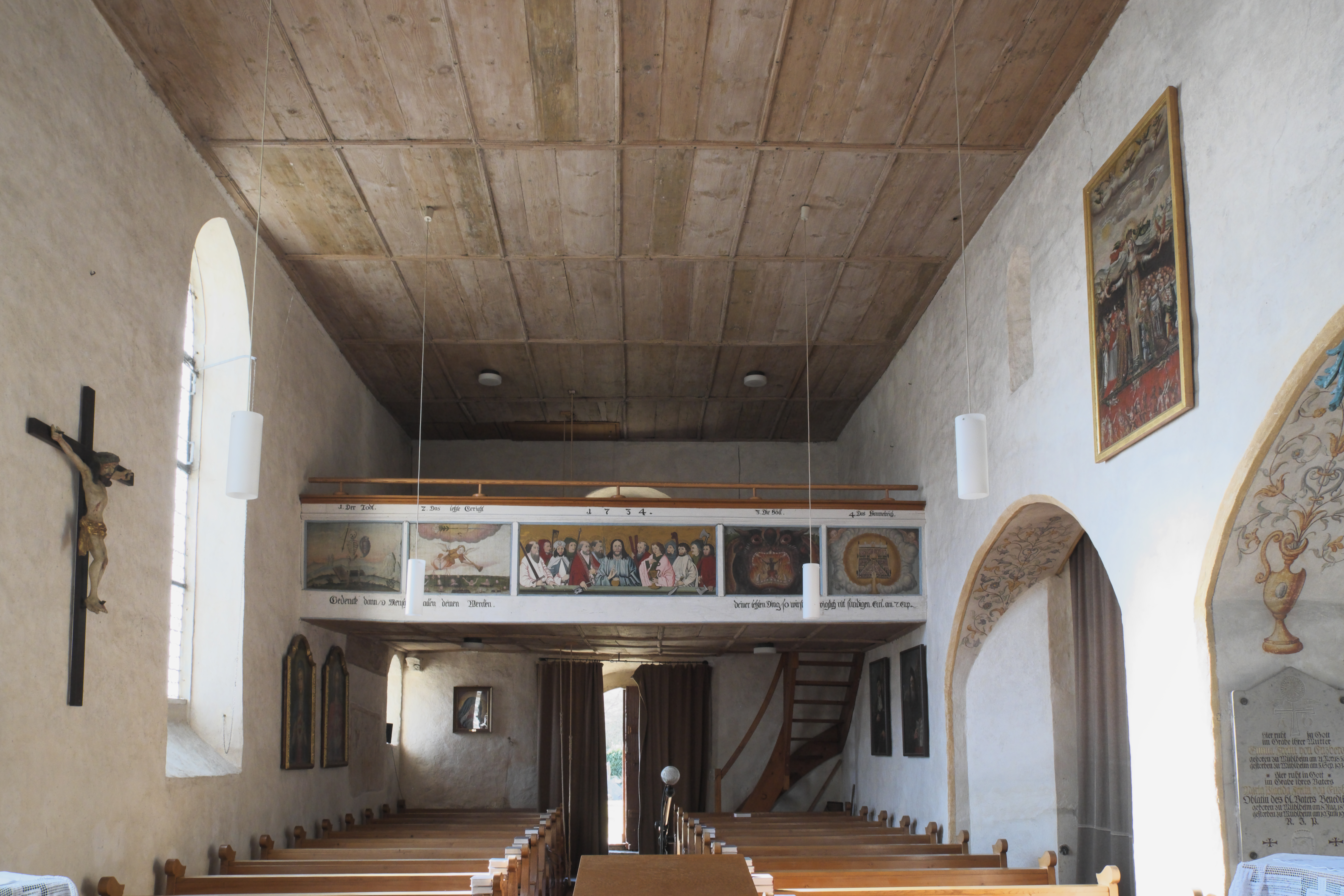 Friedhofskirche, ehemalige Pfarrkirche, St. Gallus in Mühlheim an der Donau im Landkreis Tuttlingen (Baden-Württemberg/Deutschland), Innenraum